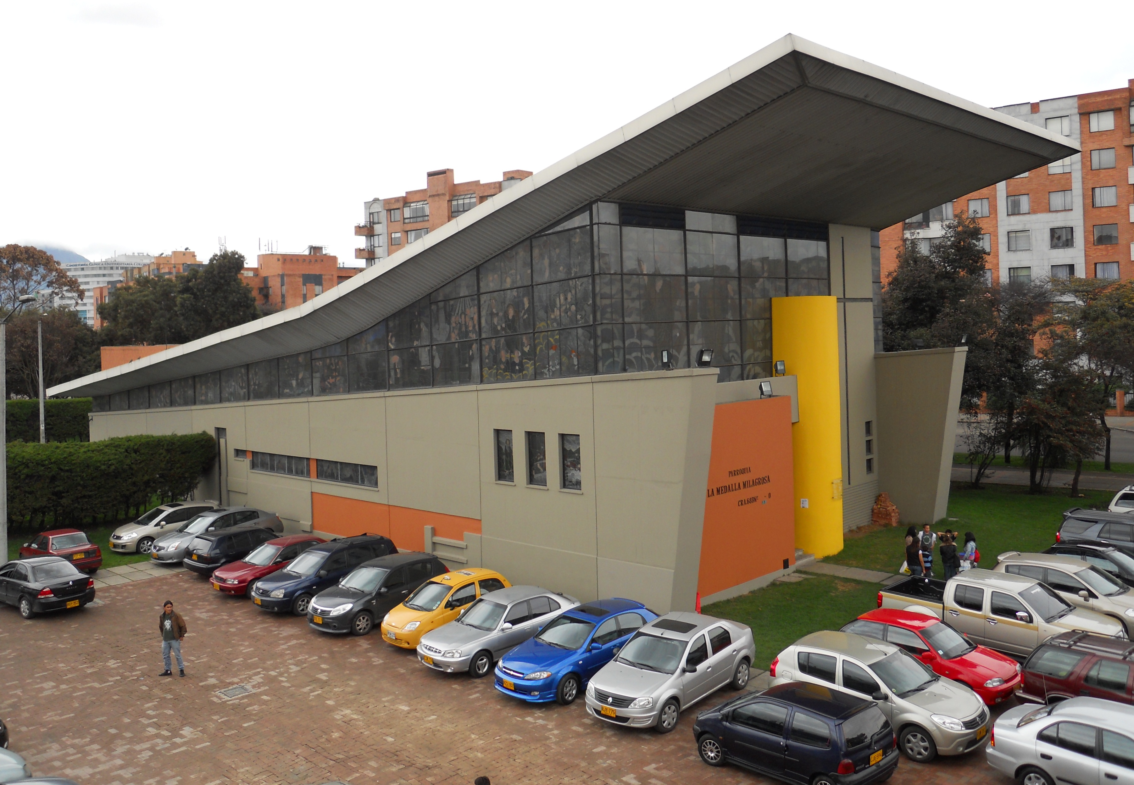 Capilla La Milagrosa en Fontibón.